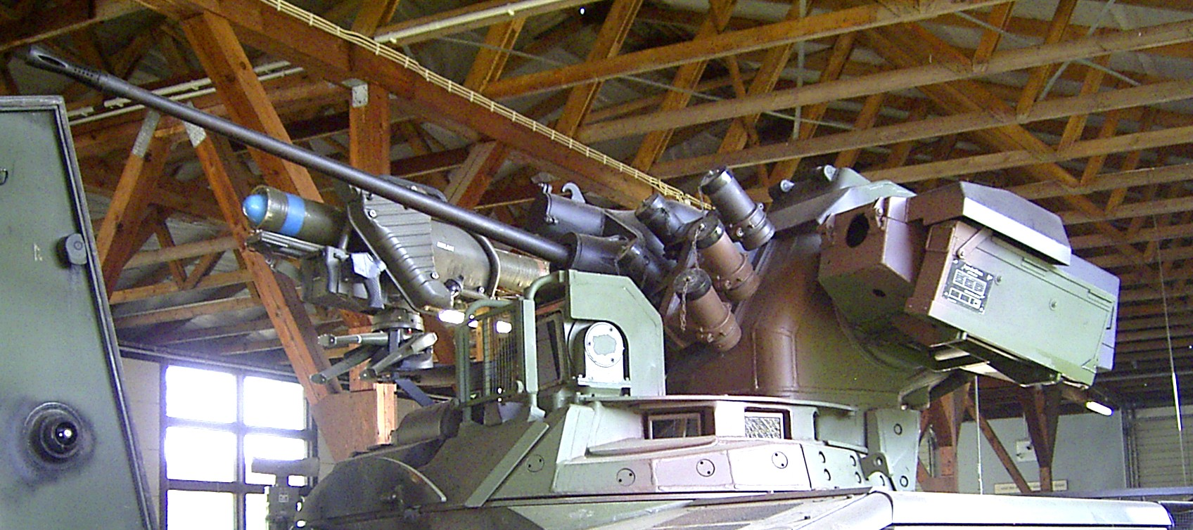 Hauptwaffen am Turm des Schützenpanzers Marder 1A3. In der Ausstellung des Panzermuseums Munster.